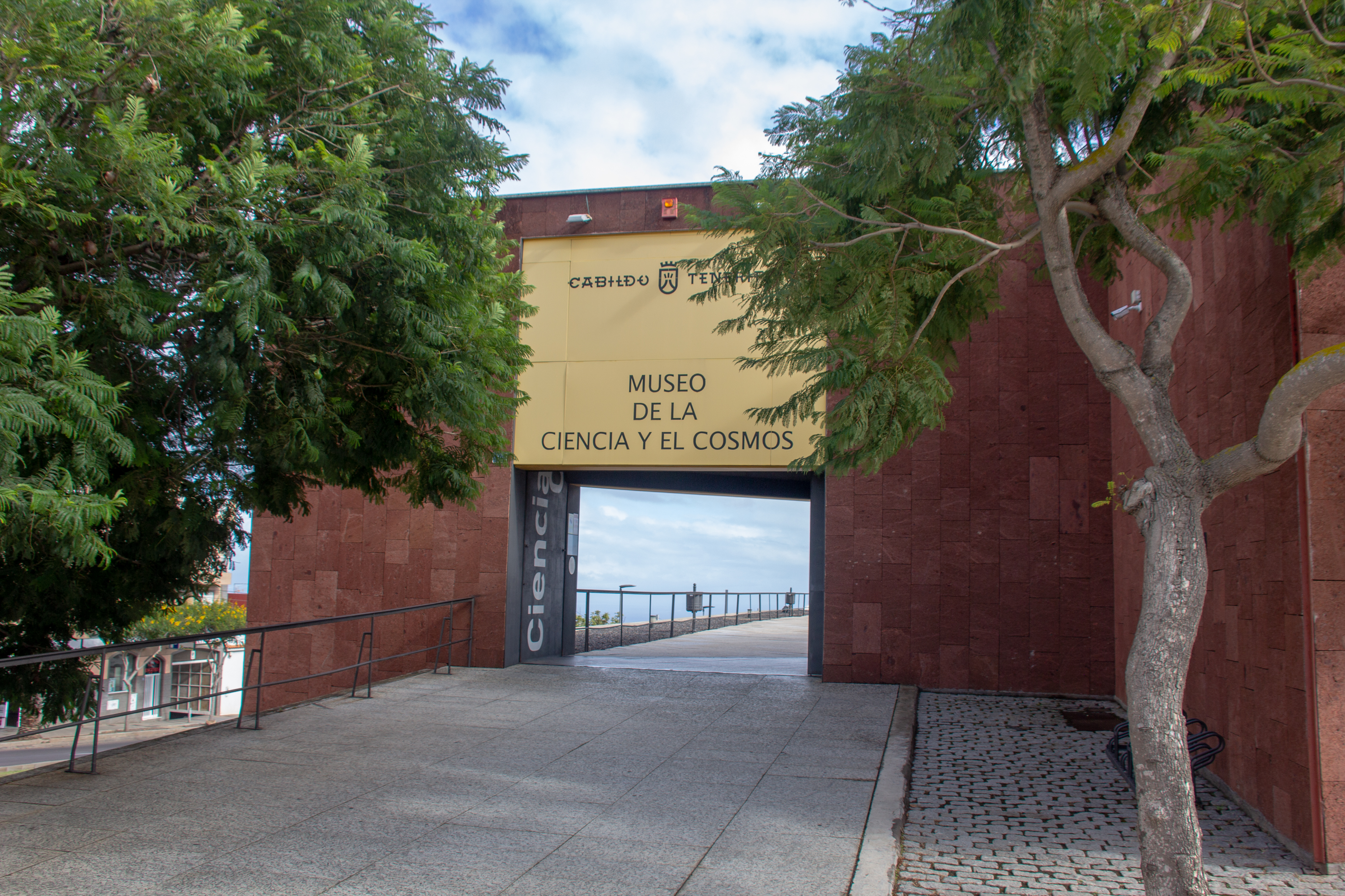 Museo de la Ciencia y el Cosmos, Tenerifel